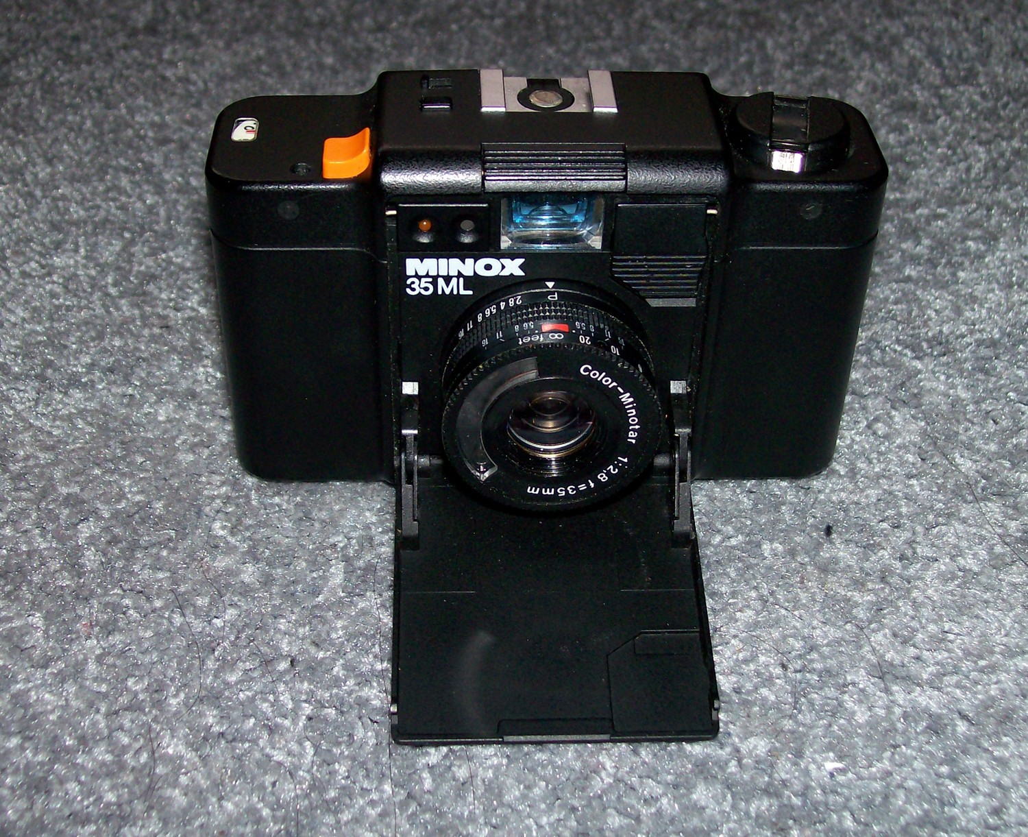 Minox 35ML compact camera